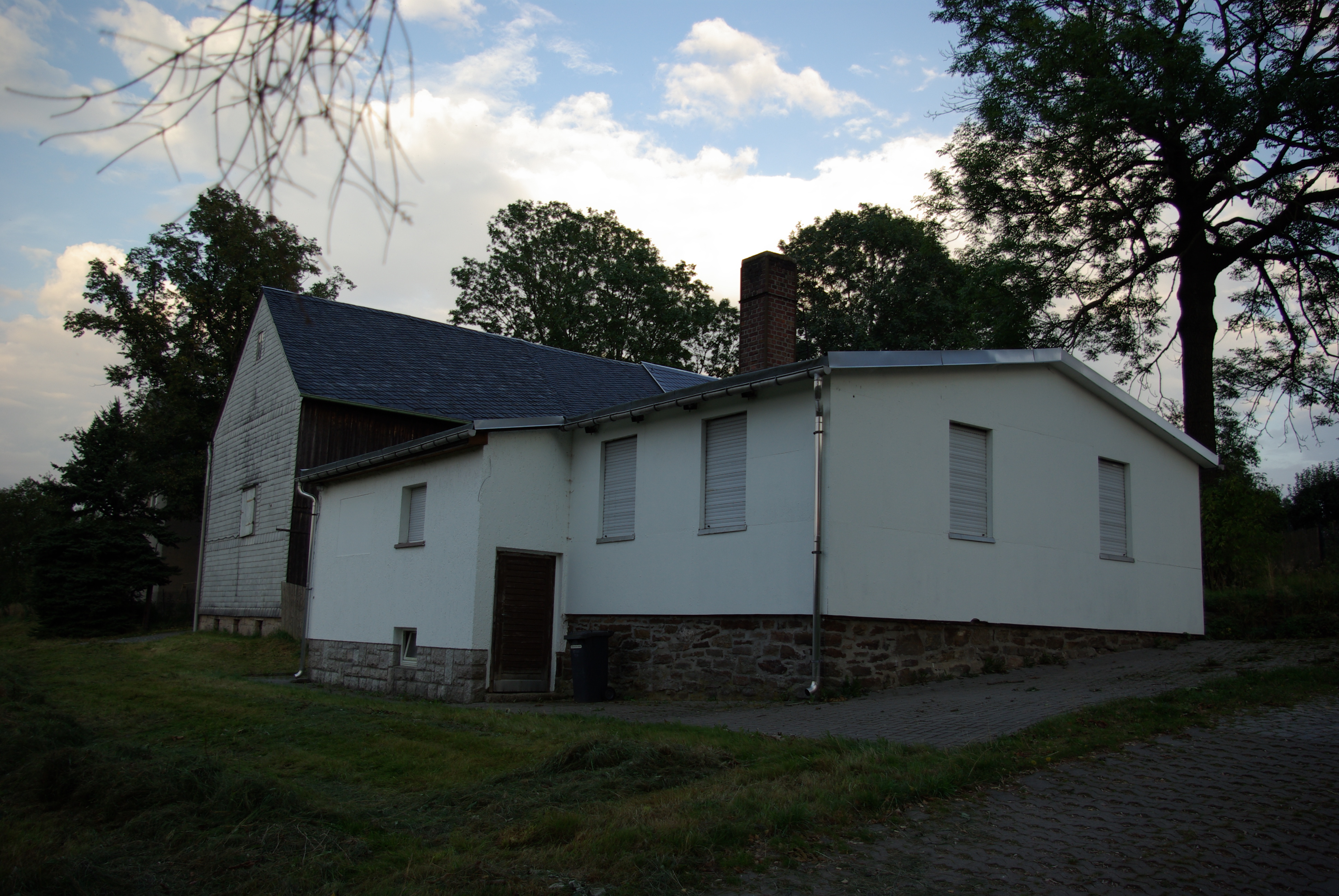 Landeskirchliche Gemeinschaft Lindenau